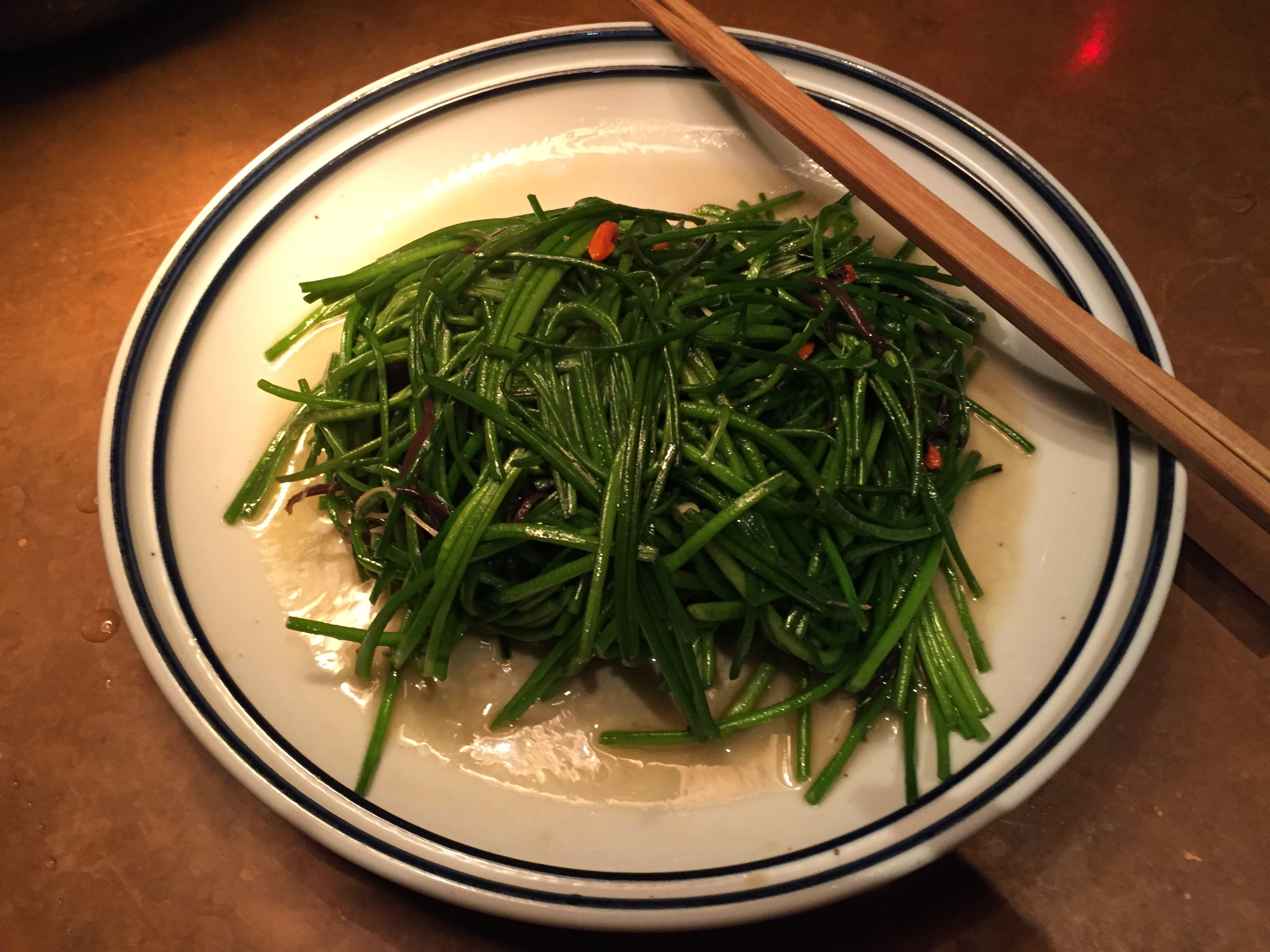 煮海, Trésors de la mer, 上引水產, 台北